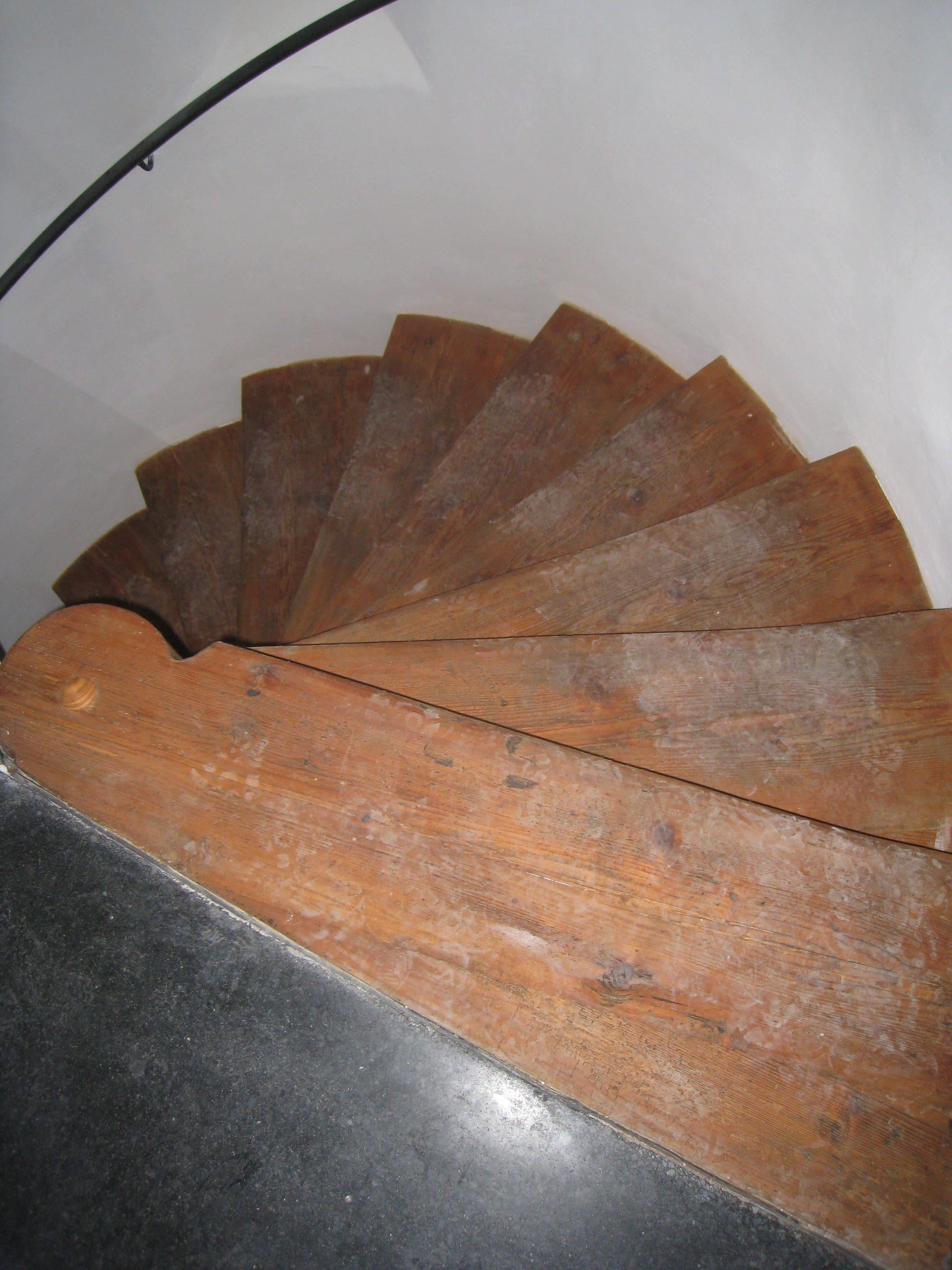 Detail točitého schodiště interiéru kostela sv. Josefa v Chrudimi, nynějšího Muzea barokních soch, po provedení rekonstrukce v letech 2009-2010.